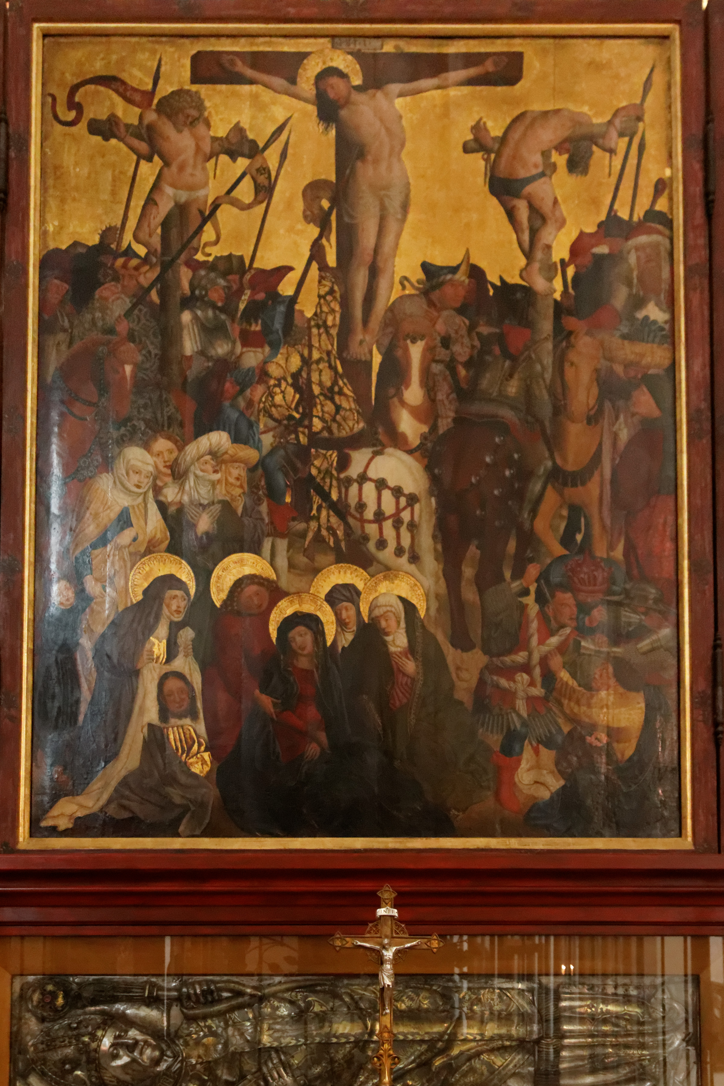 Altarbild "Münchner Domkreuzigung" aus der alten Marienkapelle in einer Seitenkapelle des Chorumgangs der Frauenkirche in München